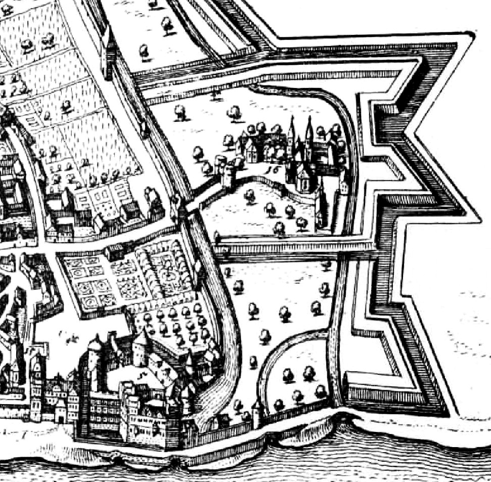 Ausschnitt aus der (gewesteten) Darstellung von Mainz bei Merian 1646: zwischen der alten Stadtmauer und den äußeren Schanzen das Stift St. Peter (Nr. 16)